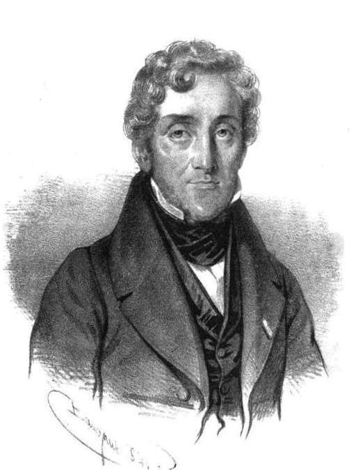 M. Le comte Molé